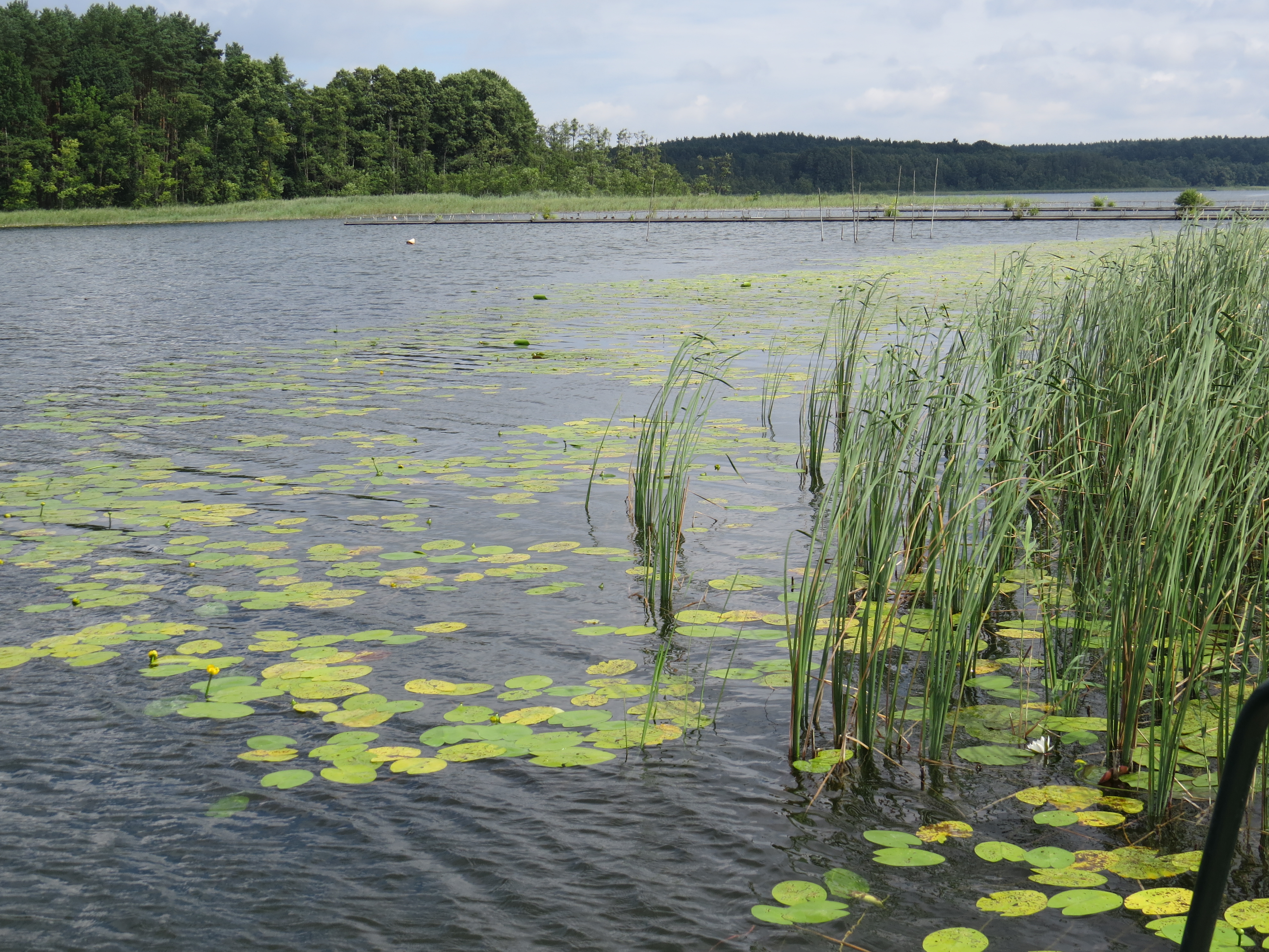 Lychen, Stargarder Tor historisch